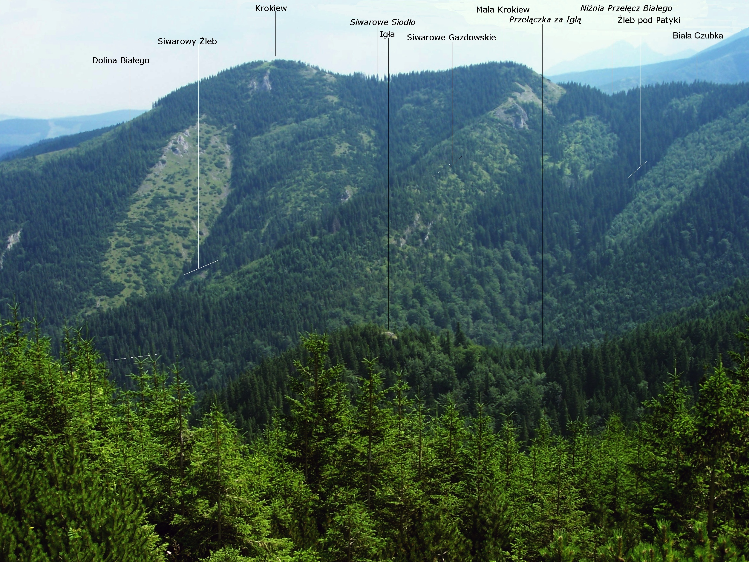 Widok z Sarniej skały na Dolinę Białego i Krokiew